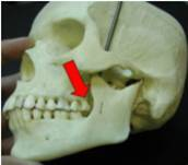 Cráneo con CAT producido por el cordal superior izquierdo, +8, extruido y vestibulizado, al impactar contra él la cara interna de la rama ascendente mandibular en el movimiento de masticación por el lado derecho.